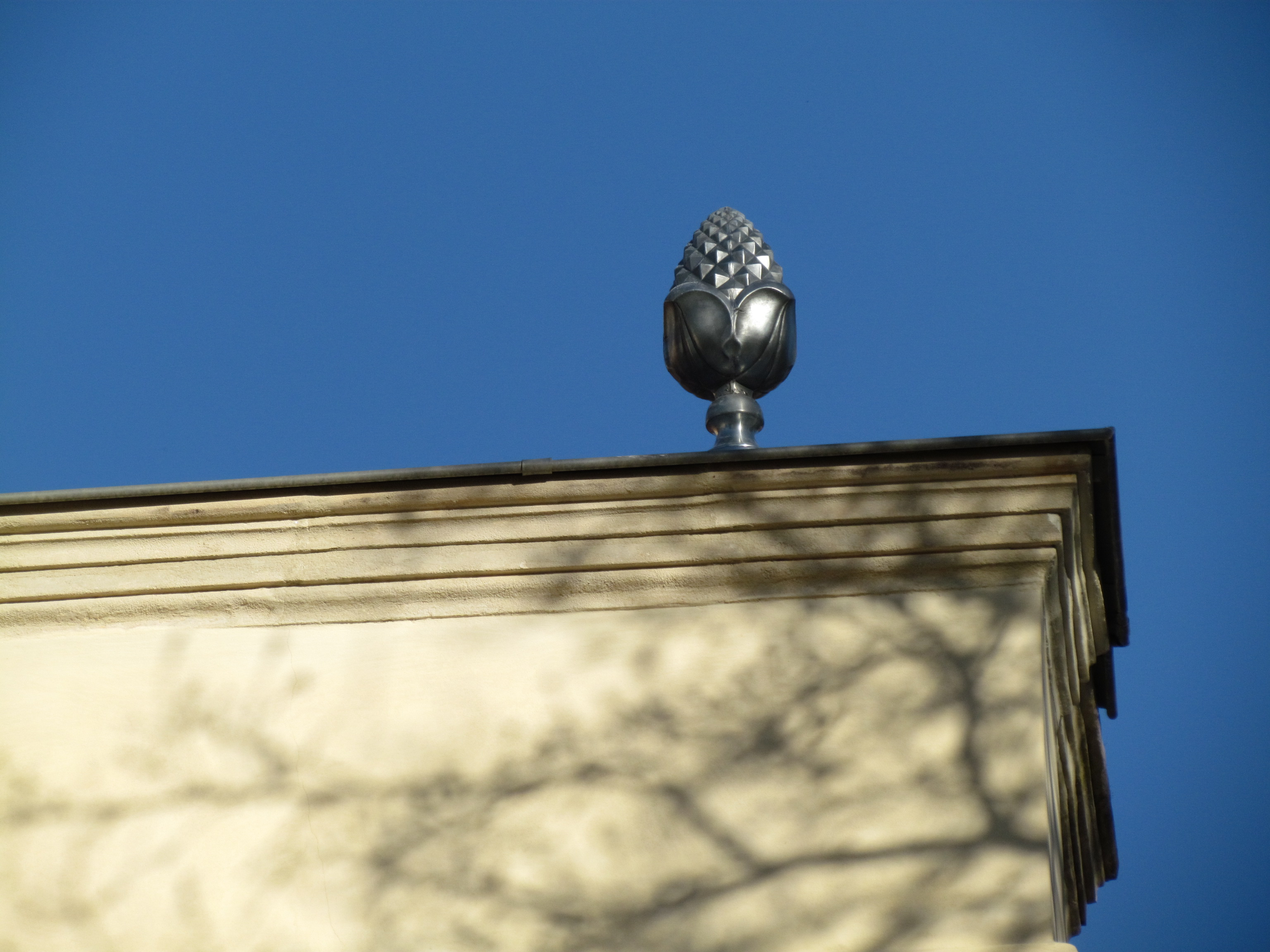 Épis pinacle